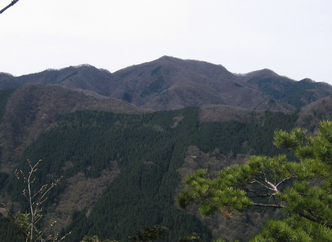 鋸尾根から望む御前山。